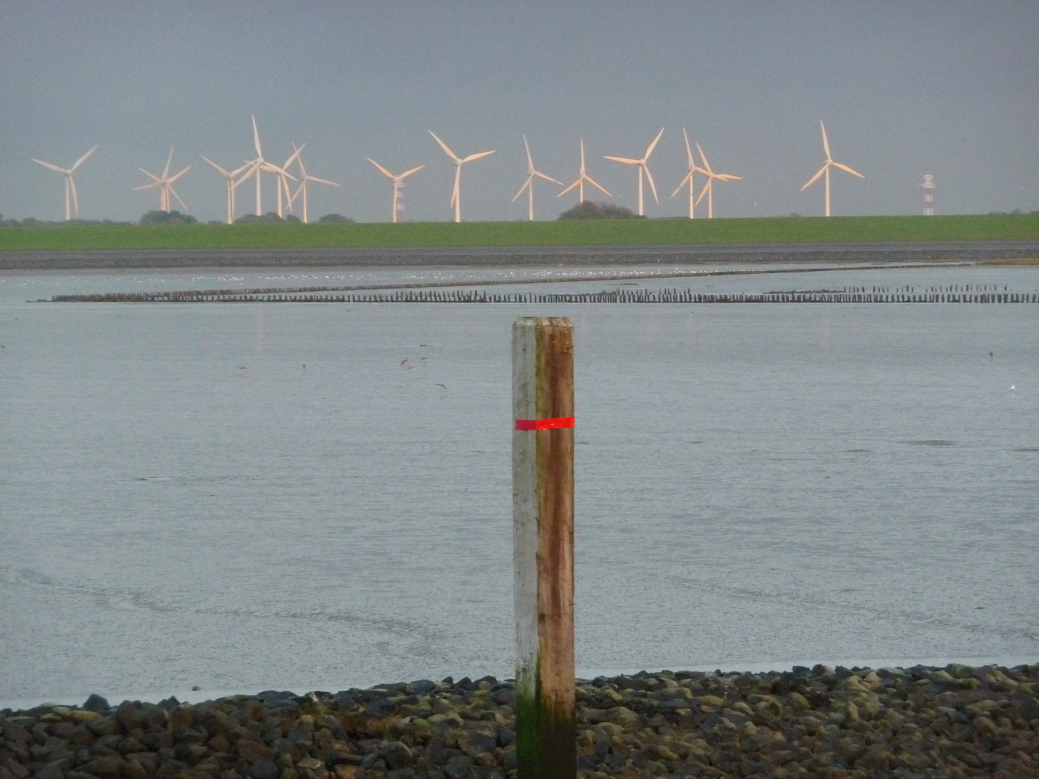 Windräder des Windparks Lütetsburg an der Küstenlinie in Norddeich (Ostfriesland, Niedersachsen, Deutschland)